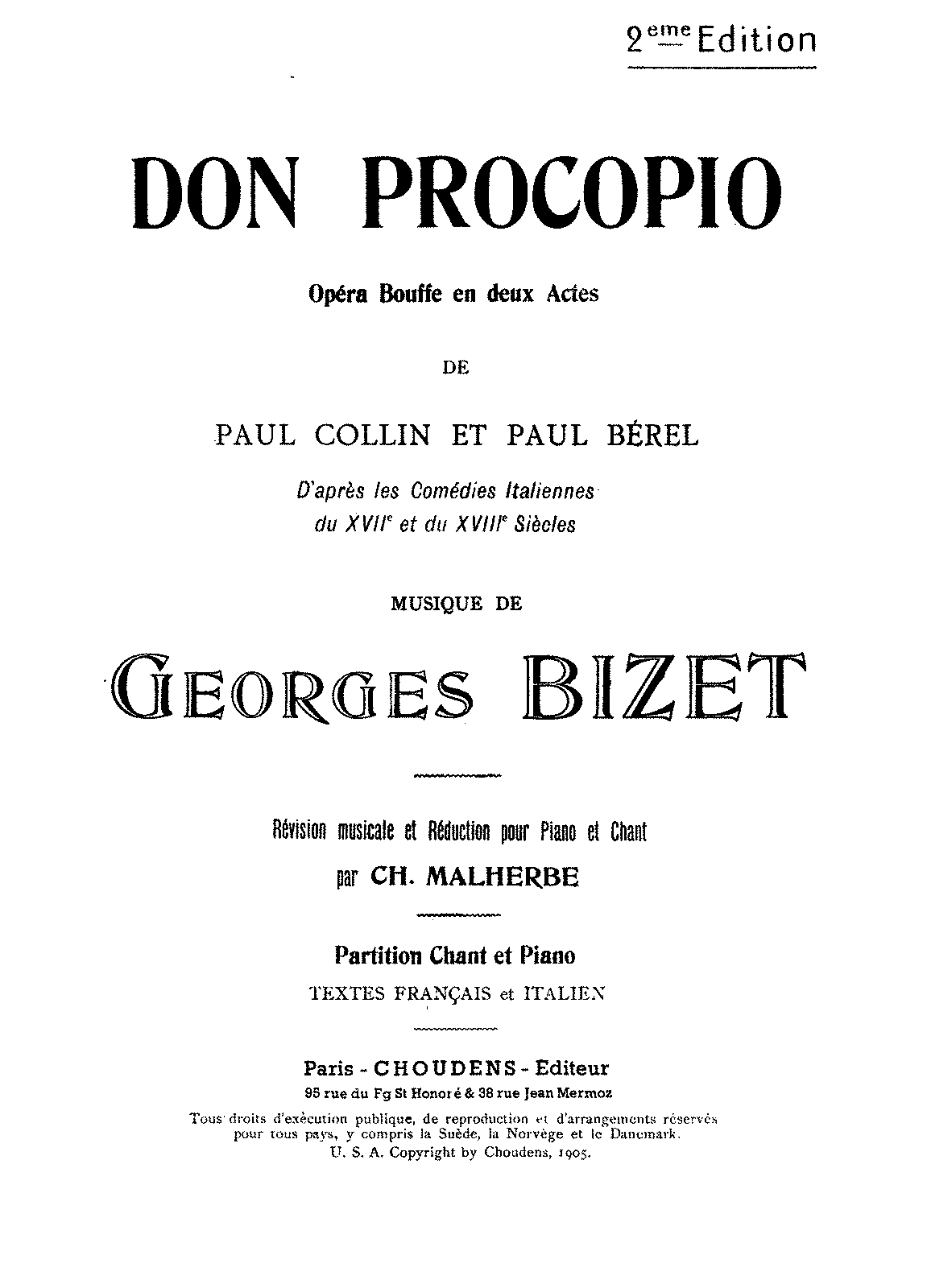 Афиша первой постановки оперы Жоржа Бизе "Дон Прокопио" в Монте-Карло в 1906 году.